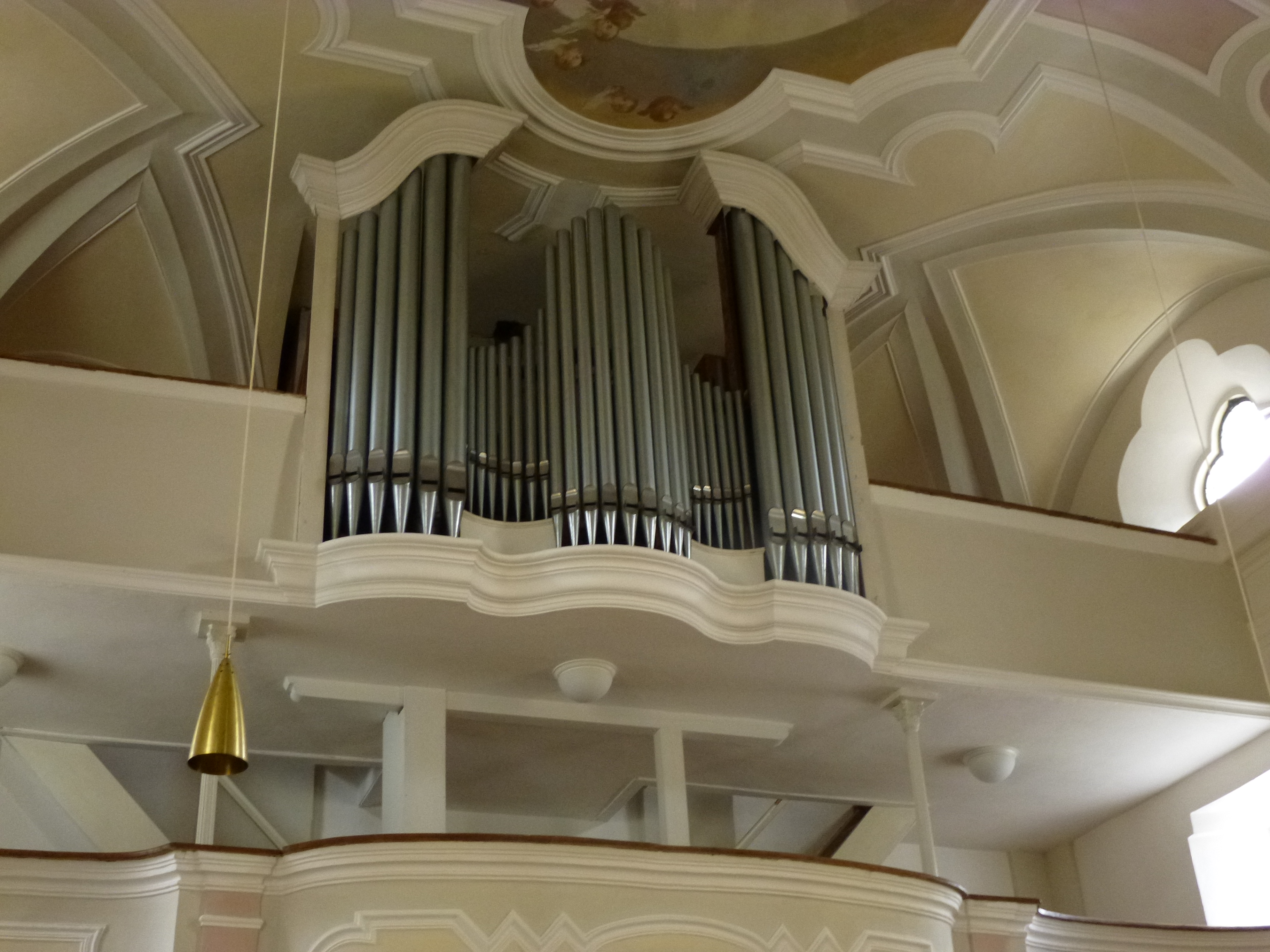 Innenansicht mit Orgel der Kath. Pfarrkirche St. Georg in Mitterfels.This is a photograph of an architectural monument.